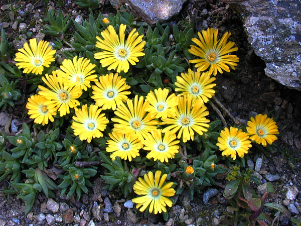 Plante d'Afrique du sud de 3 à 5 cm. Zone 5 (Photo en culture)